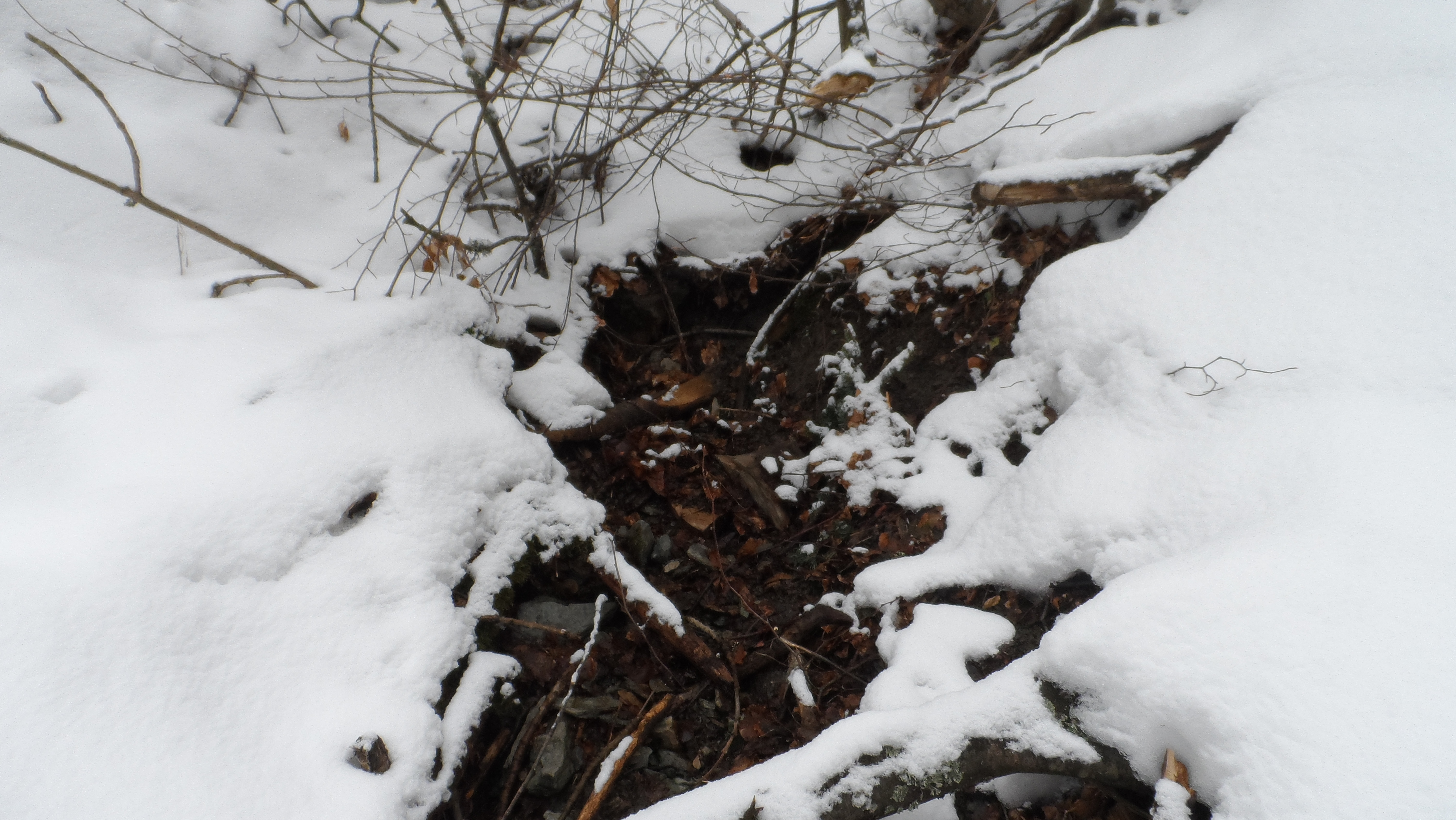 Prameň Bodvy v závere doliny Čierna Moldava, na úpätí Osadníka